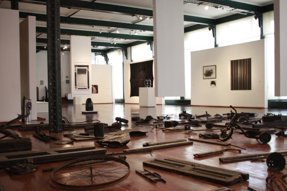 Instalación del artista mexicano Arturo Hernández Alcázar, expuesta de febrero a abril de 2012 en Capilla del Arte